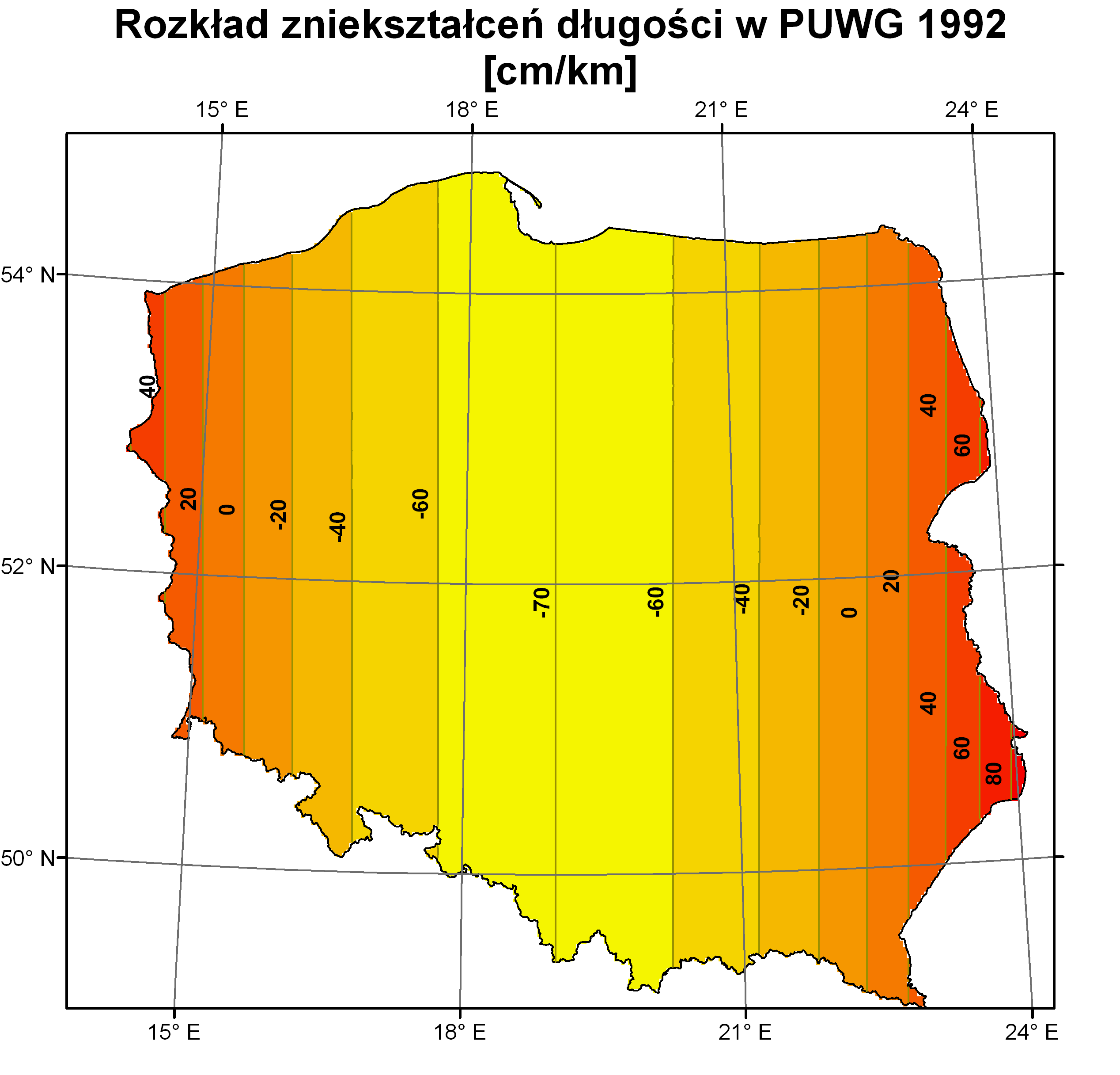 Zniekształcenia długości w PUWG 1992.